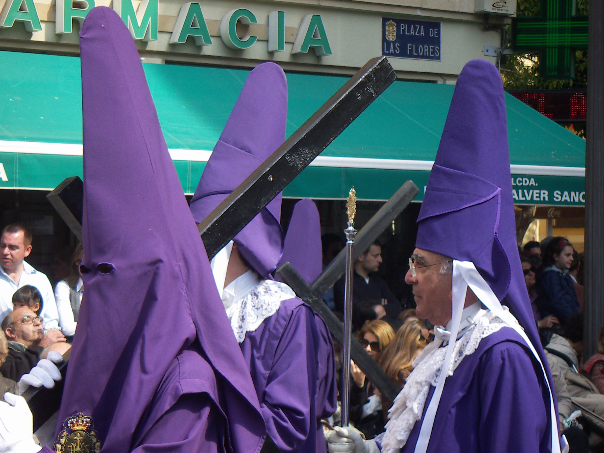 Imagen de un nazareno penitente y un mayordomo de la Semana Santa de Murcia. Indumentarias propias del siglo XVIII